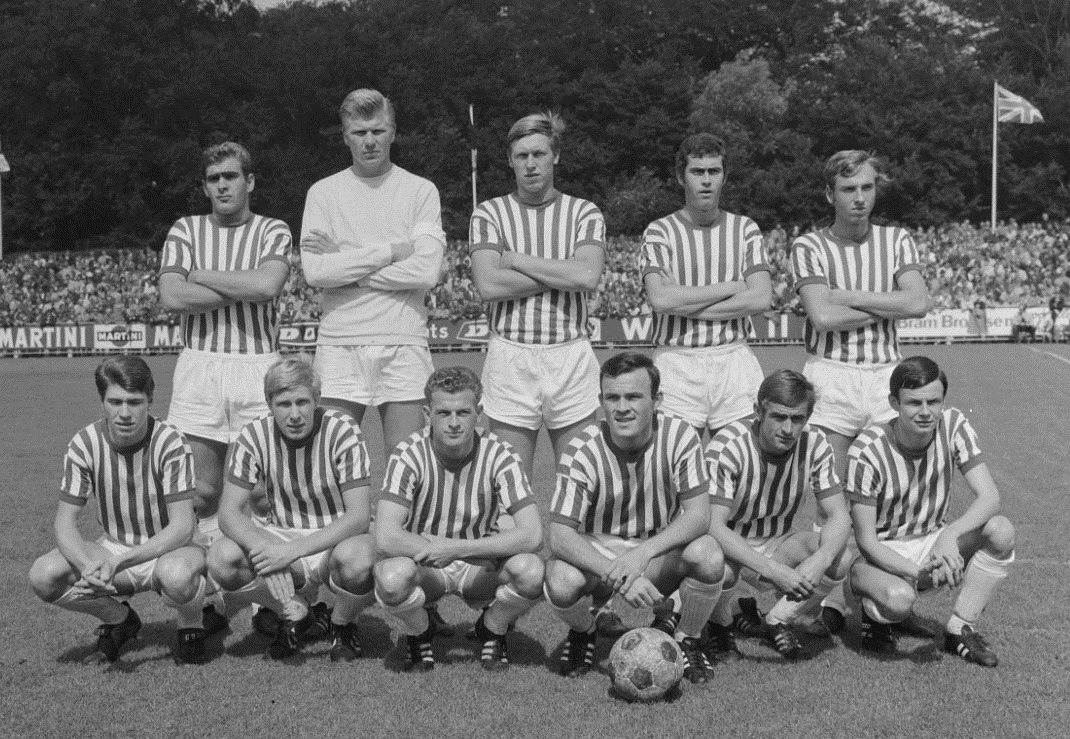 Het elftal van Holland Sport. Staand vlnr Teske, v. Vianen, v. Maurik, Dorjee, Don, zittend vlnr v.d. Bol, Roggeveen, Valkenhoff, Verlangen, Bolleboom, Kronshorst